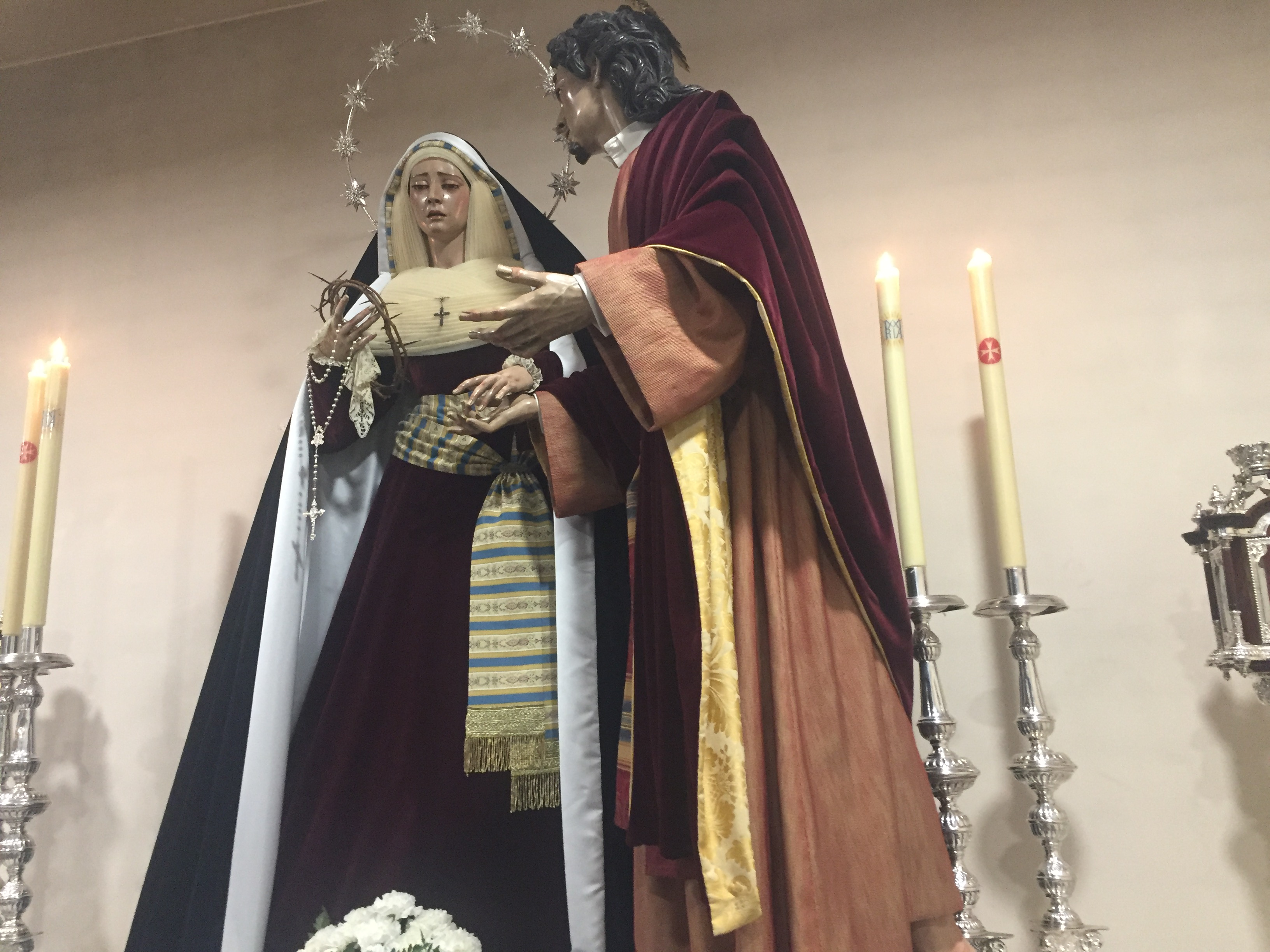 Dulce nombre